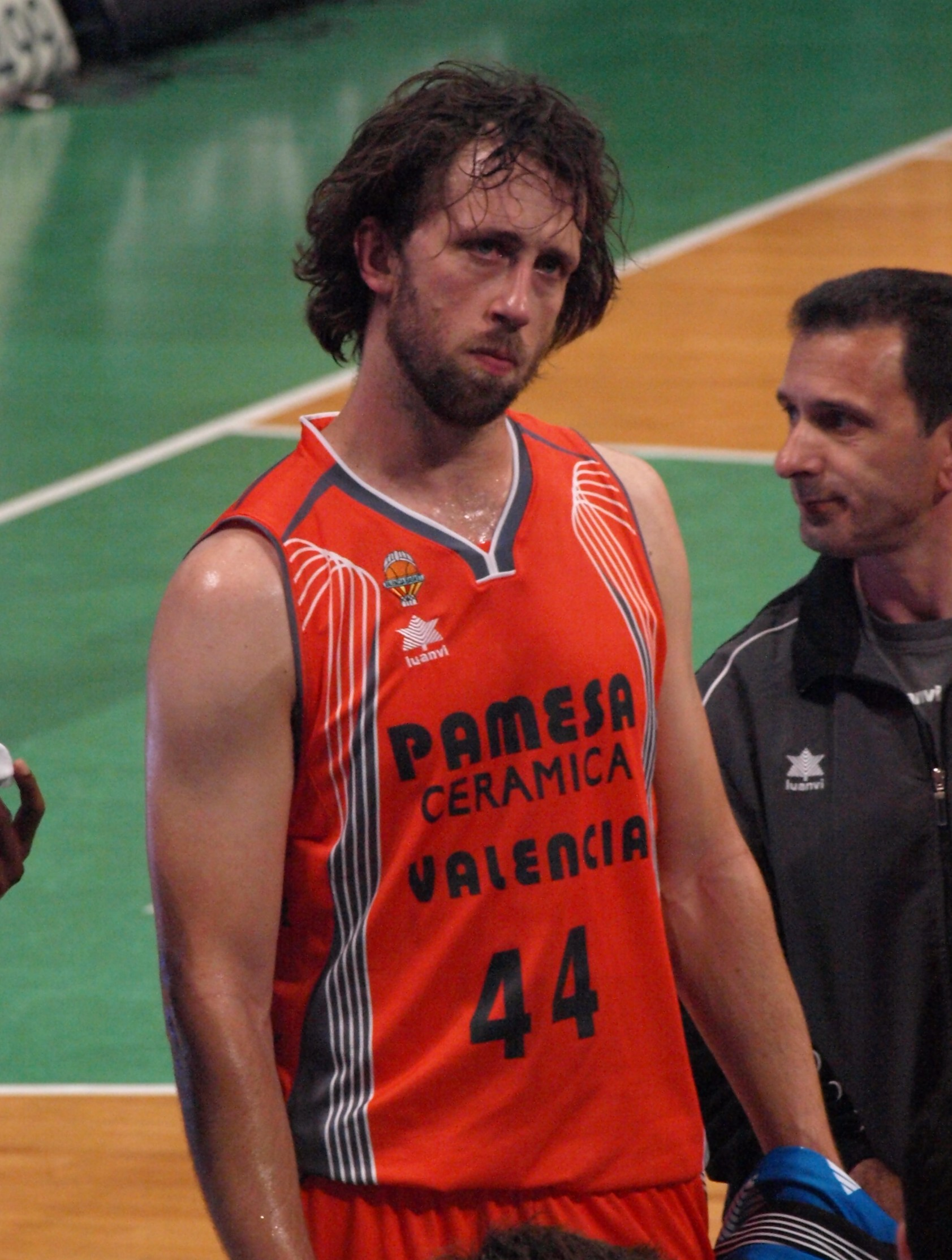 Matt Nielsen con la camiseta del Pamesa Valencia en el Olímpico de Badalona